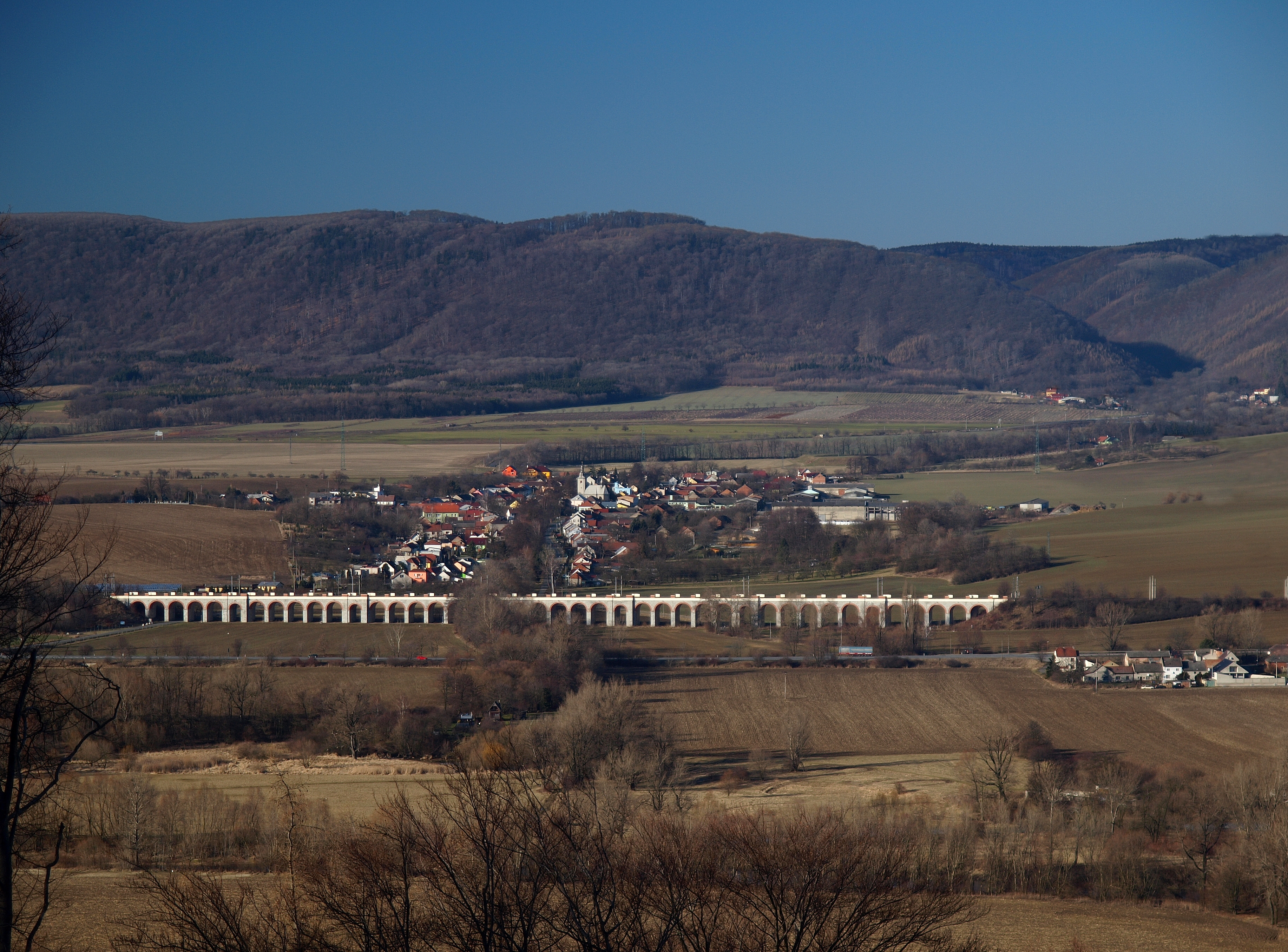 Železniční most - dva tzv. jezernické viadukty, Jezernice